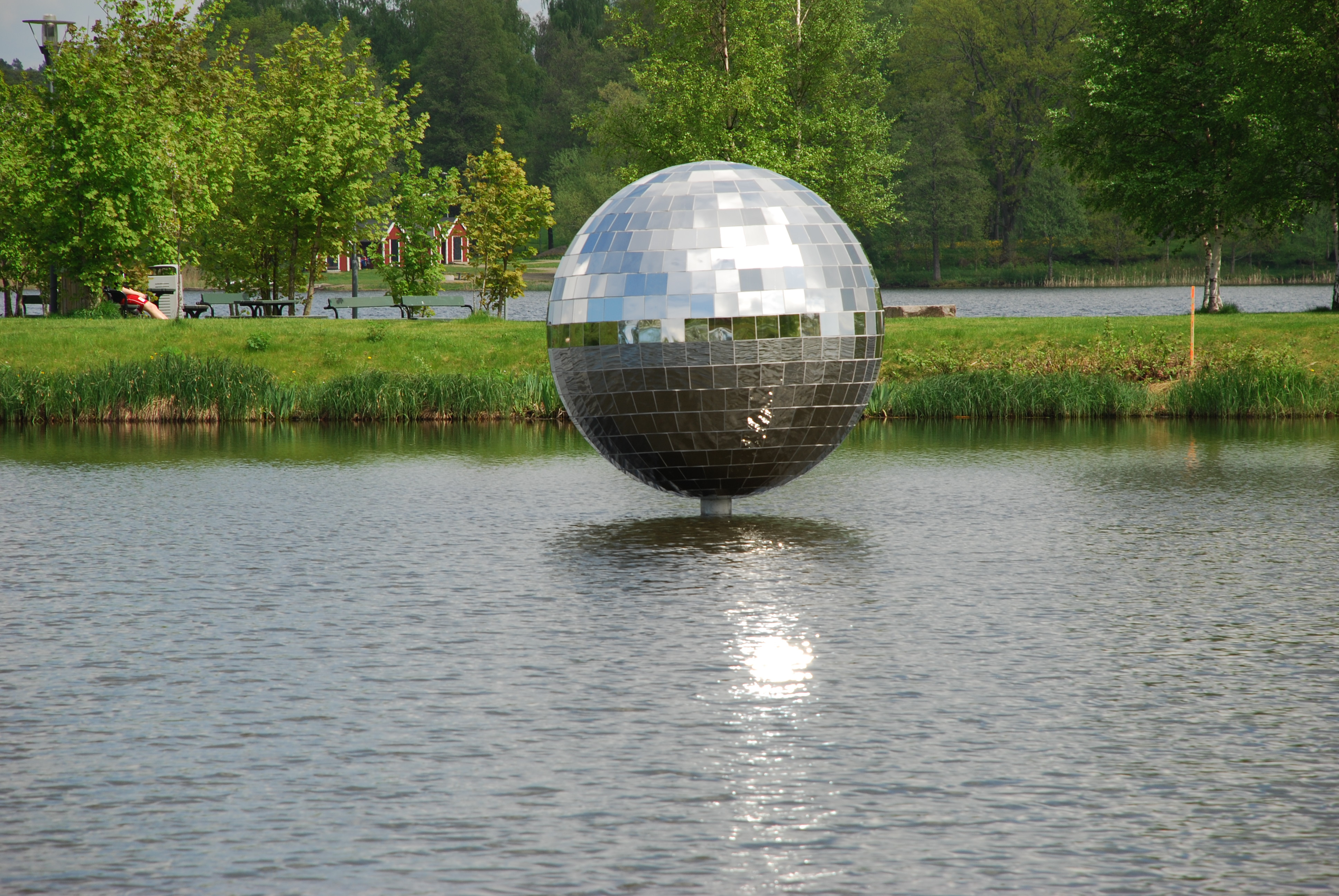 Diskokula